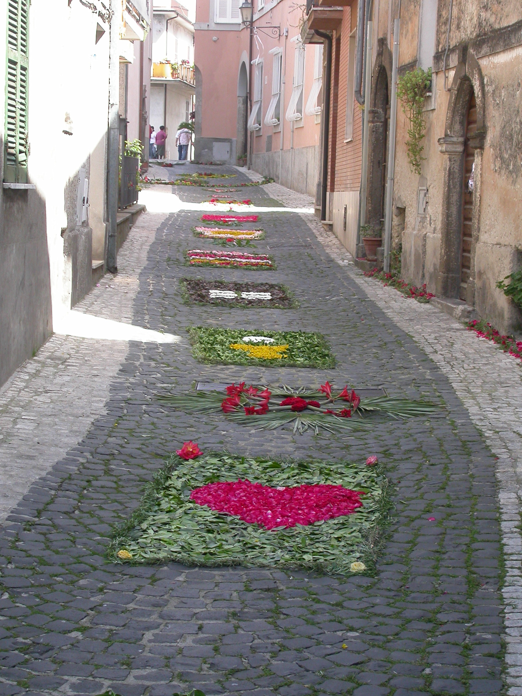 Via San Lorenzo, a Colli (frazione di Monte San Giovanni Campano) nell'infiorata del 2008